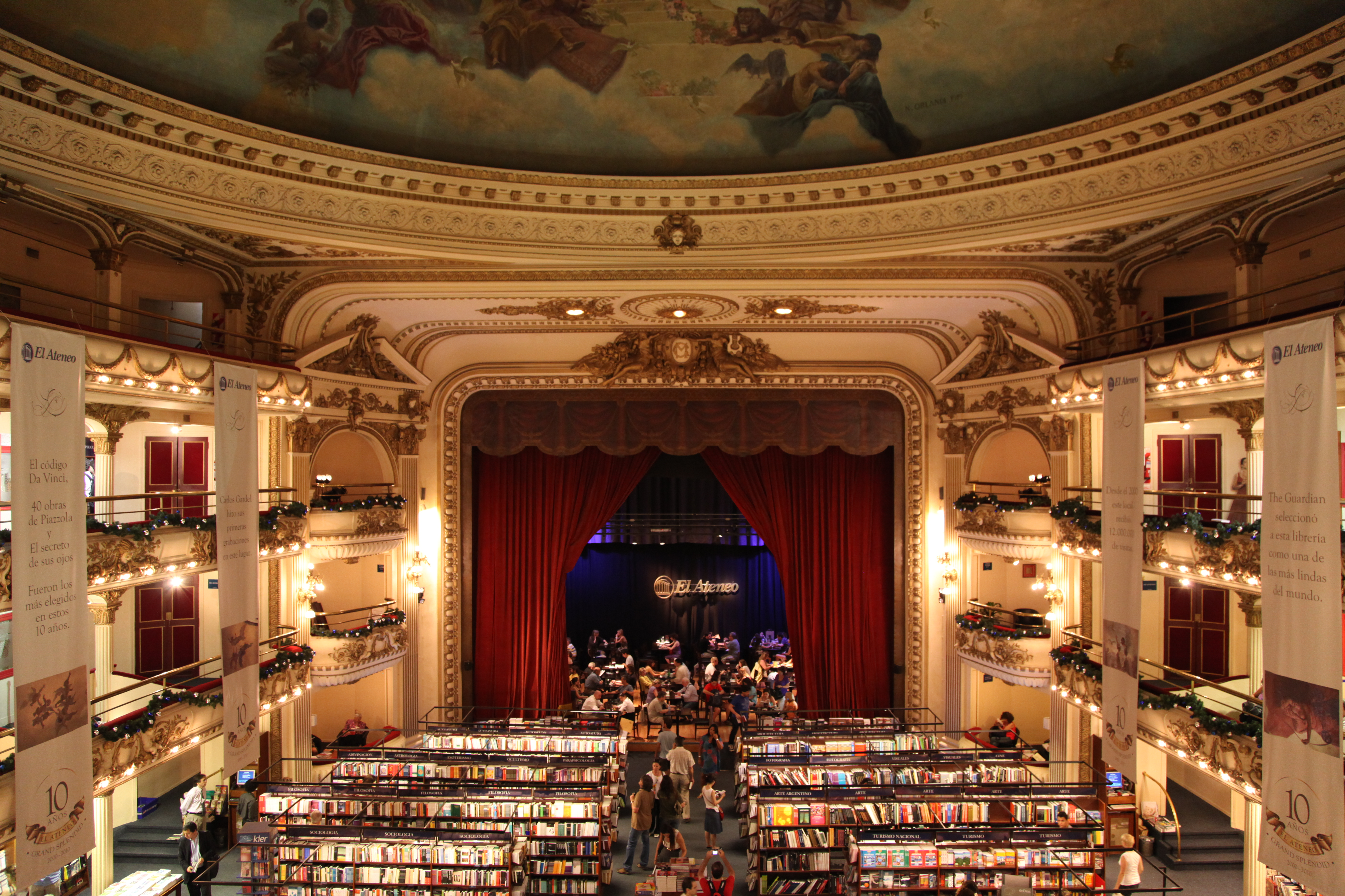 El Ateneo bookstore